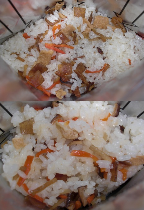 pregelatinized rice